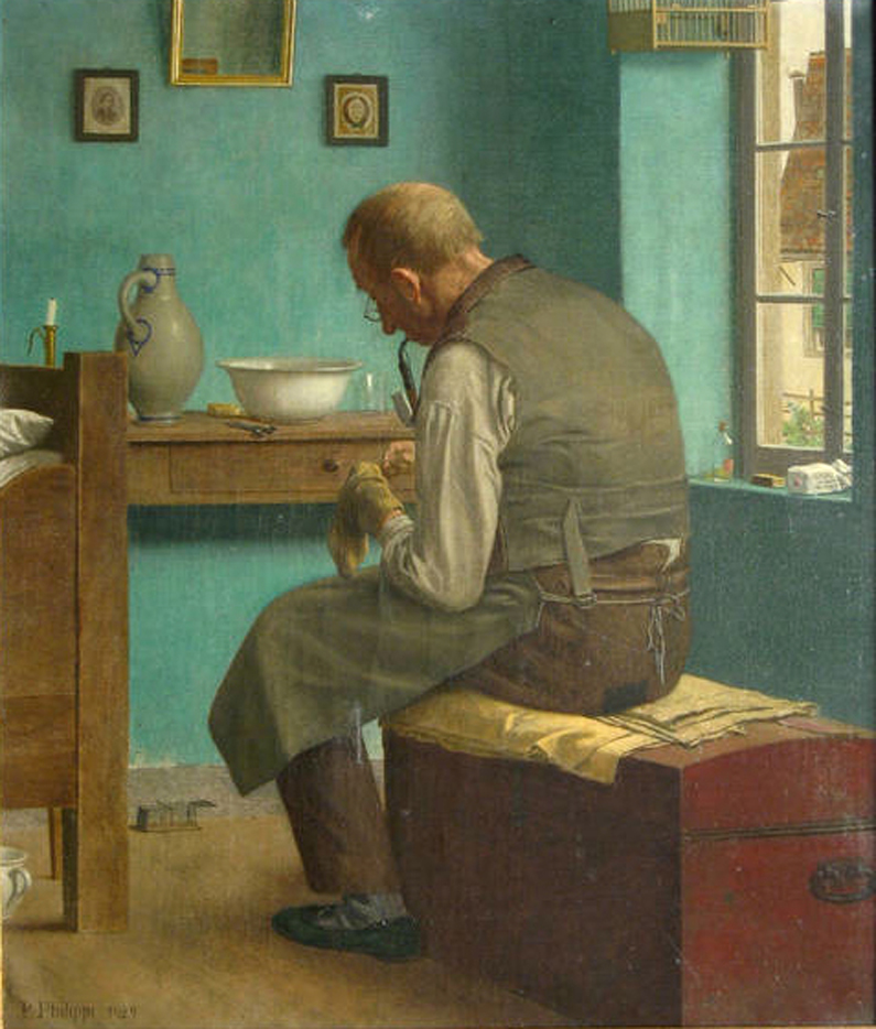 Peter Philippi, Der Junggeselle, Öl auf Leinwand, signiert und datiert 1929